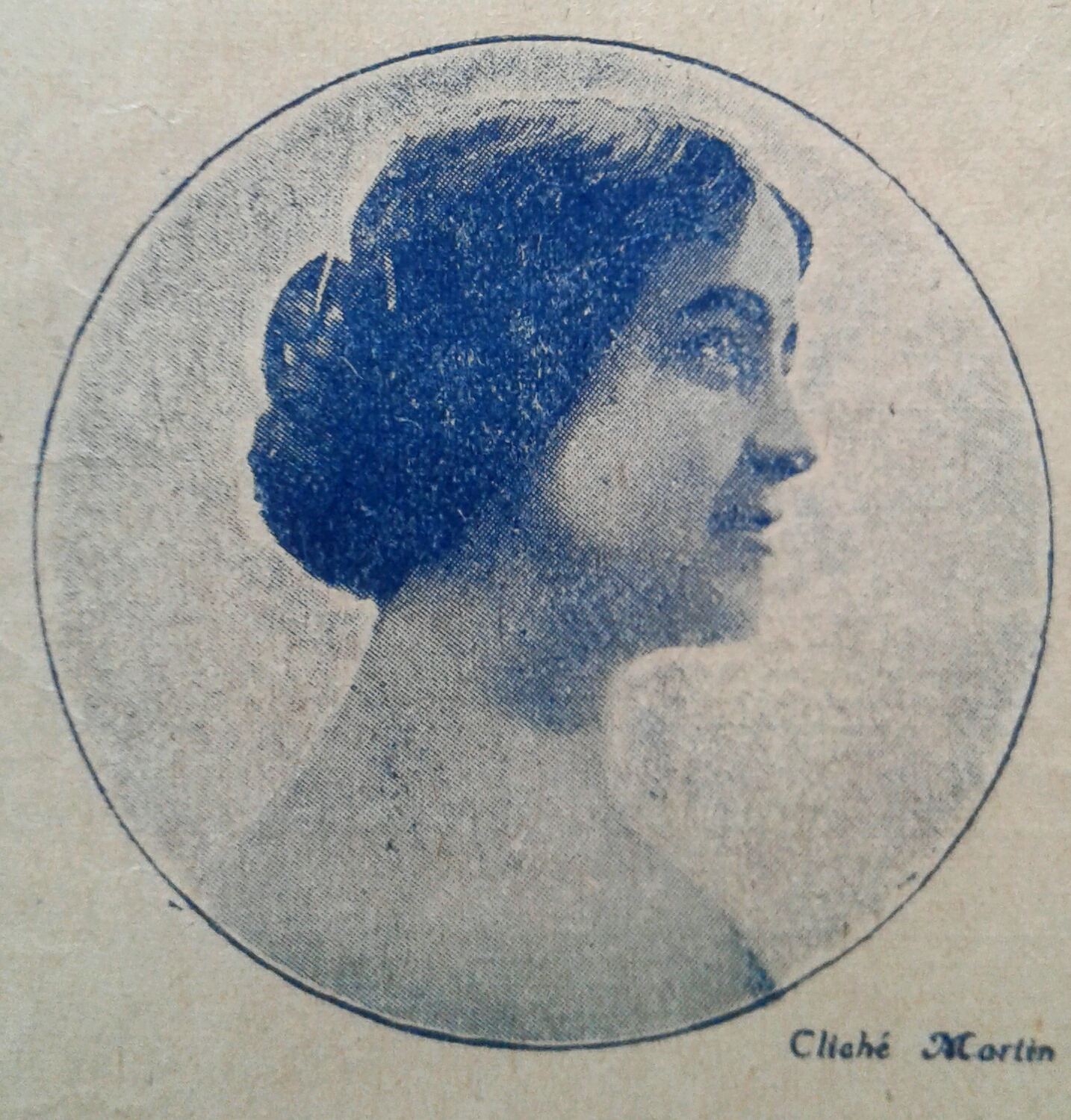 Portrait de la chanteuse lyrique Carmen Vildez.